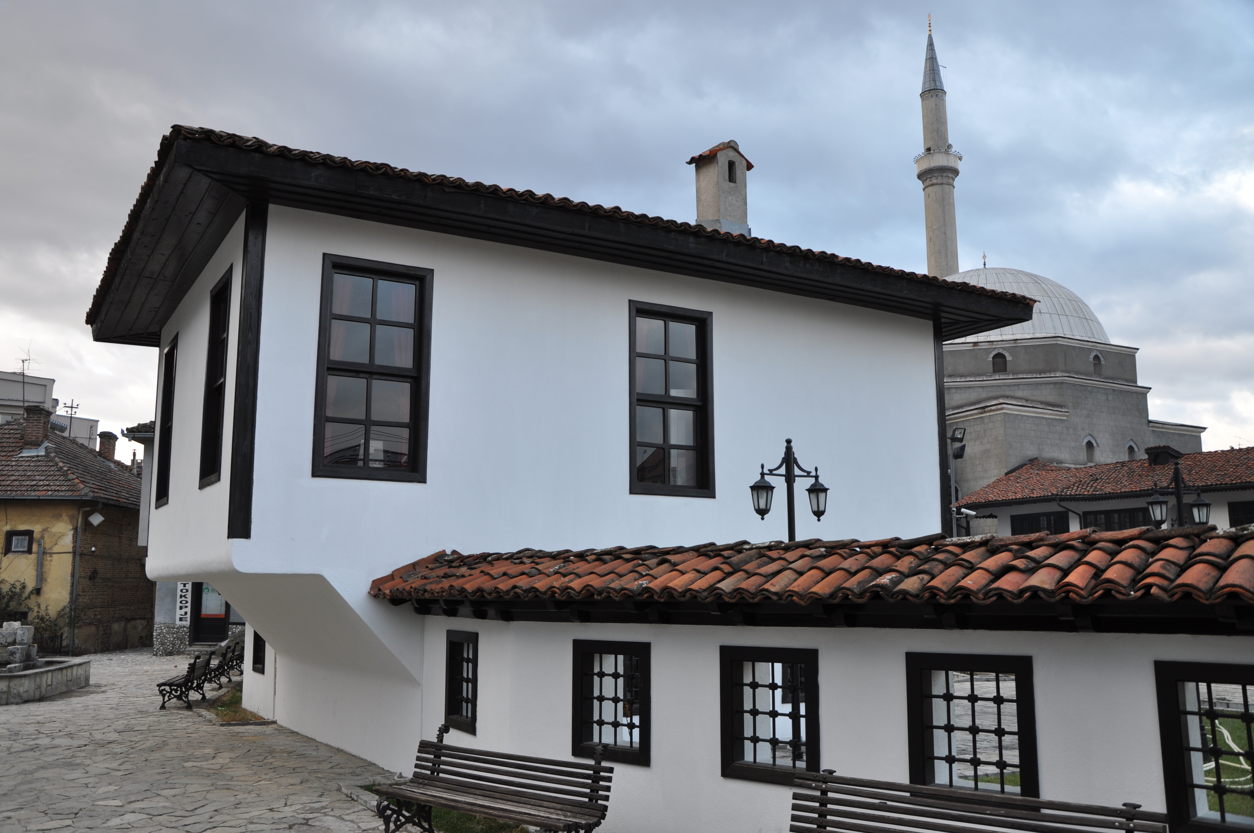 Ndërtesa e Lidhjes së Prizrenit